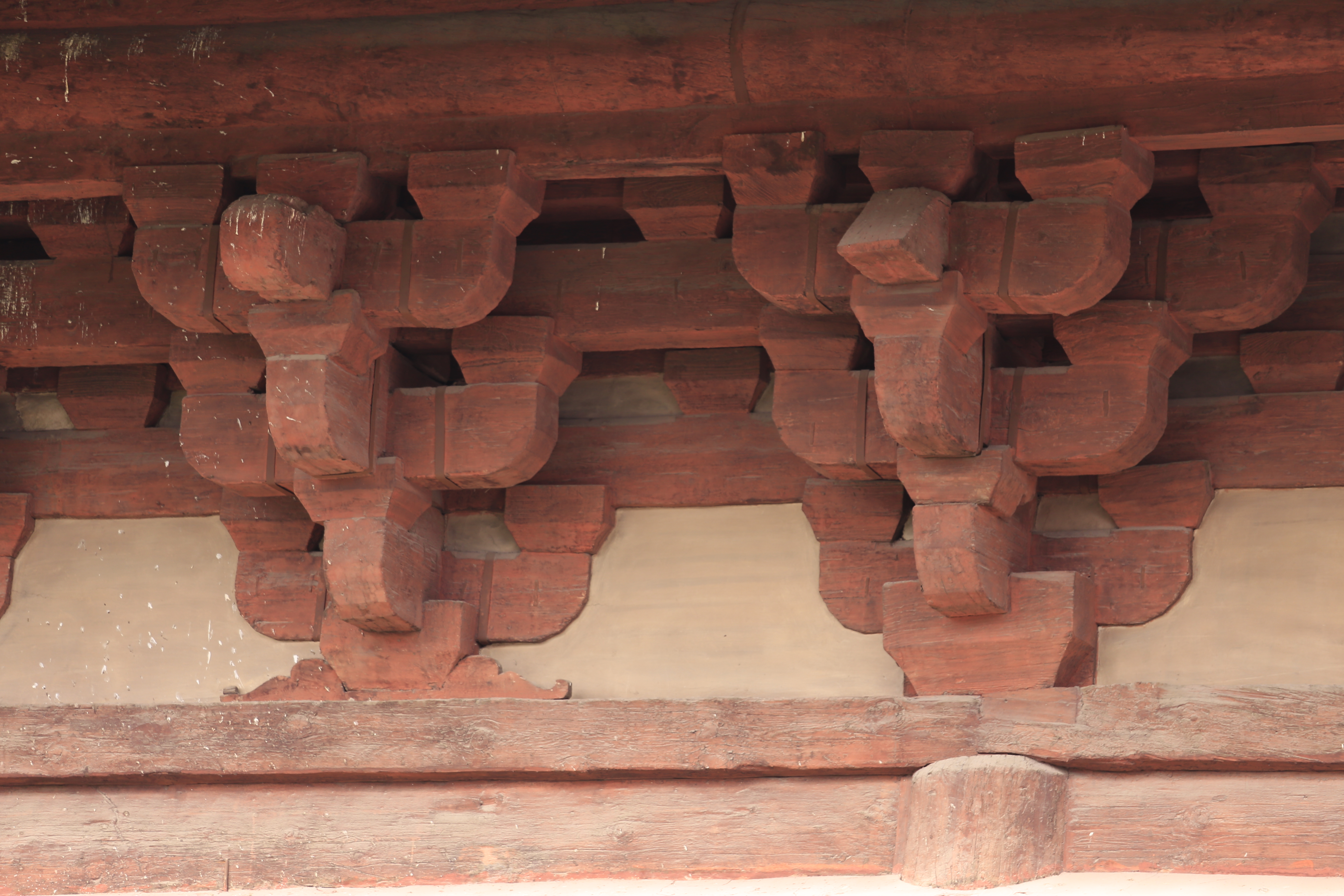 大同华严寺—— 大雄宝殿前檐斗栱